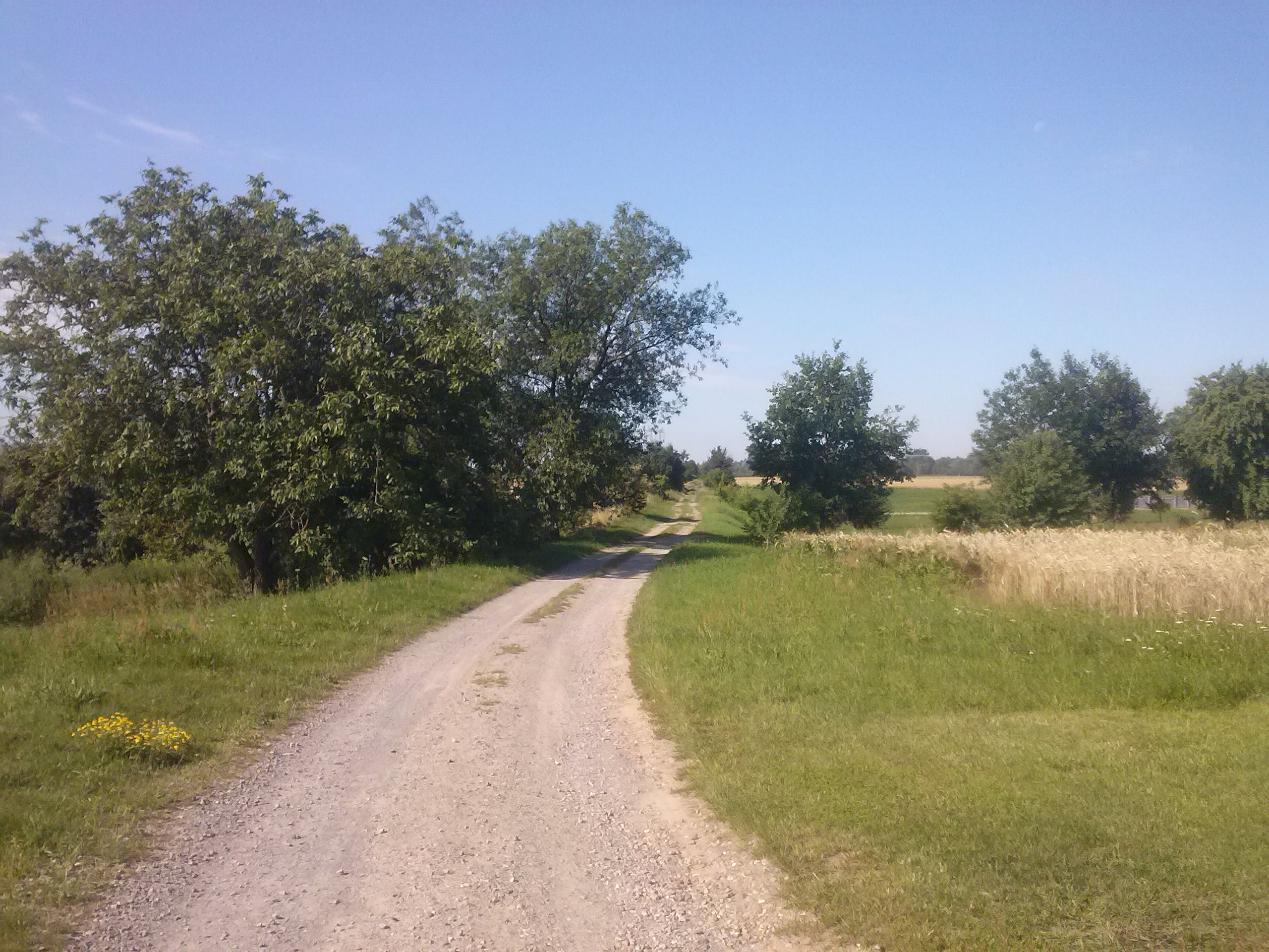 Droga w kierunku Sanu (dawna kamienista Galicyjska trasa Przeworsk - Sieniawa), z końca XIX wieku